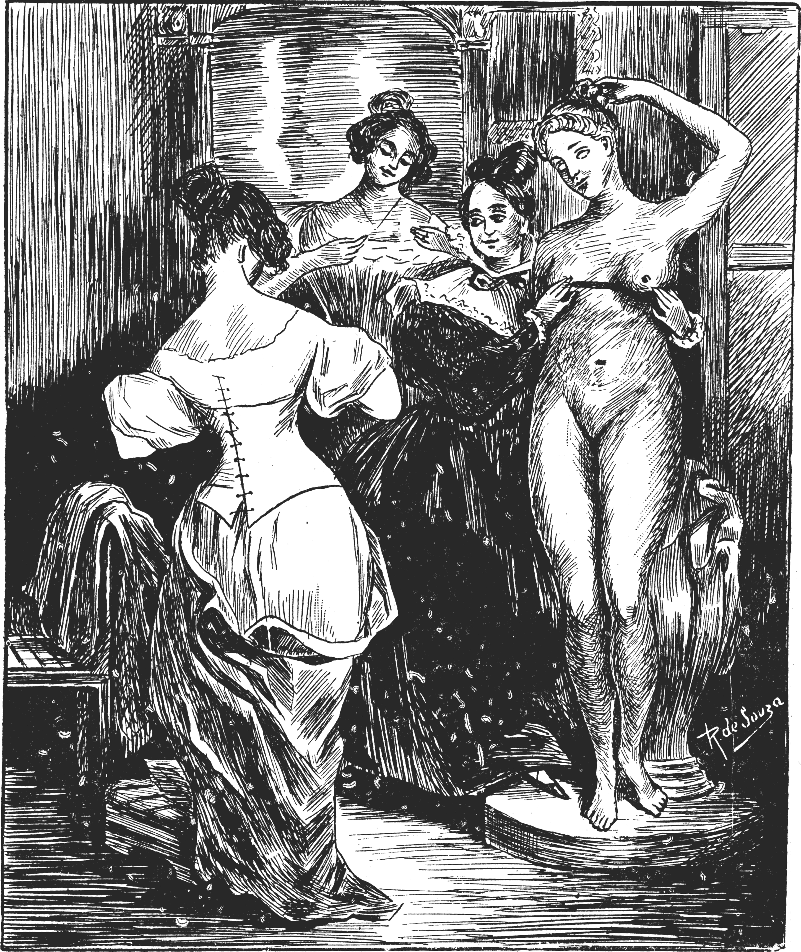 Fig. 107. — Flatterie de corsetière. — C'est juste la taille de la Venus ! (Deveria).